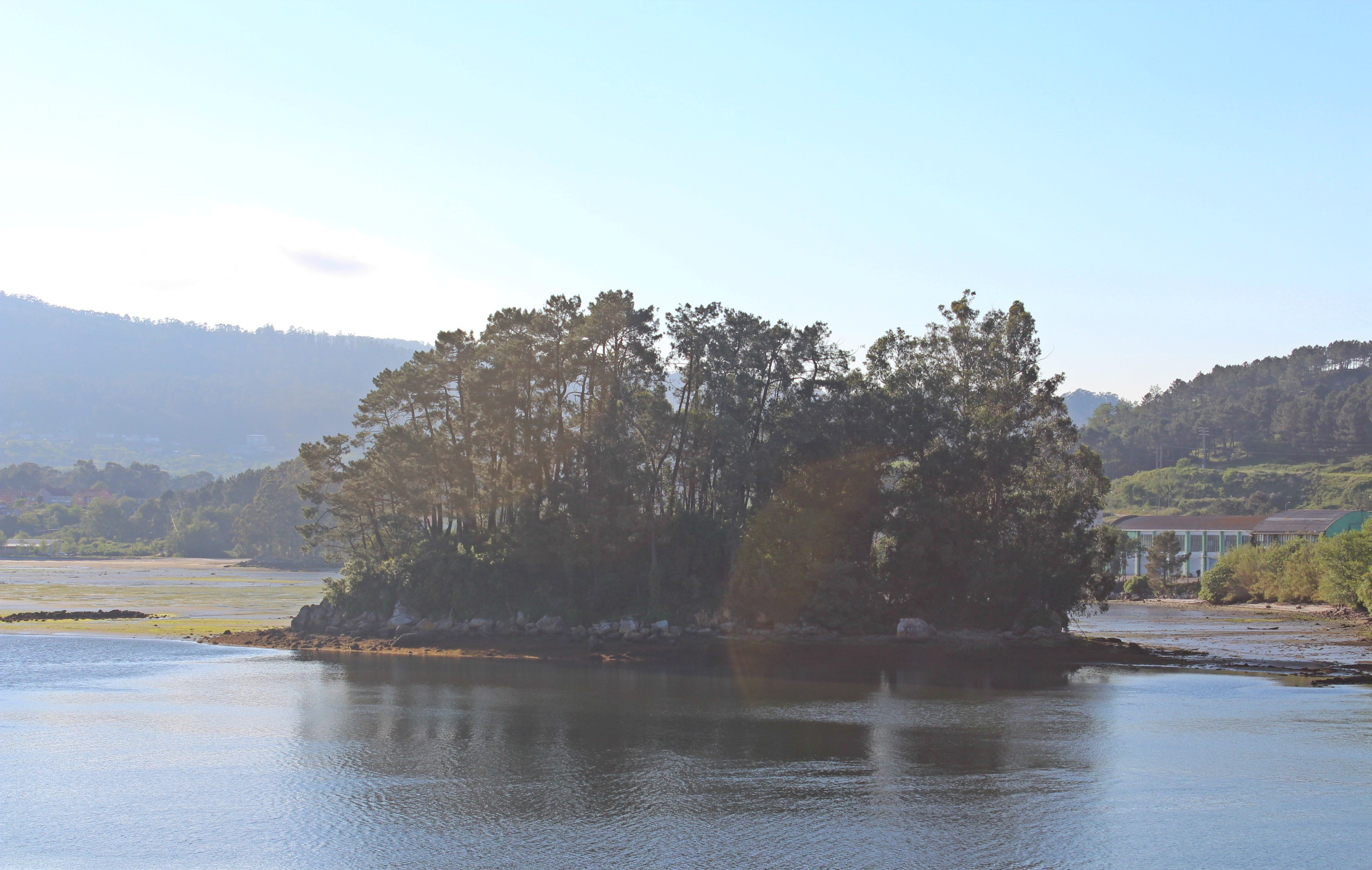 Illote do Castelo, en Vilaboa.